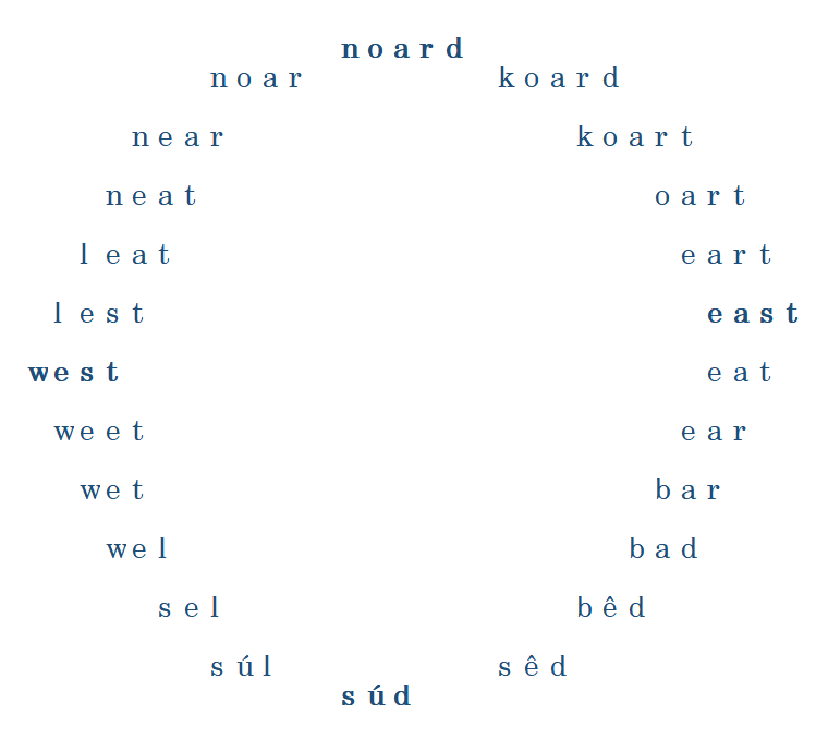 Rûne wurdljedder